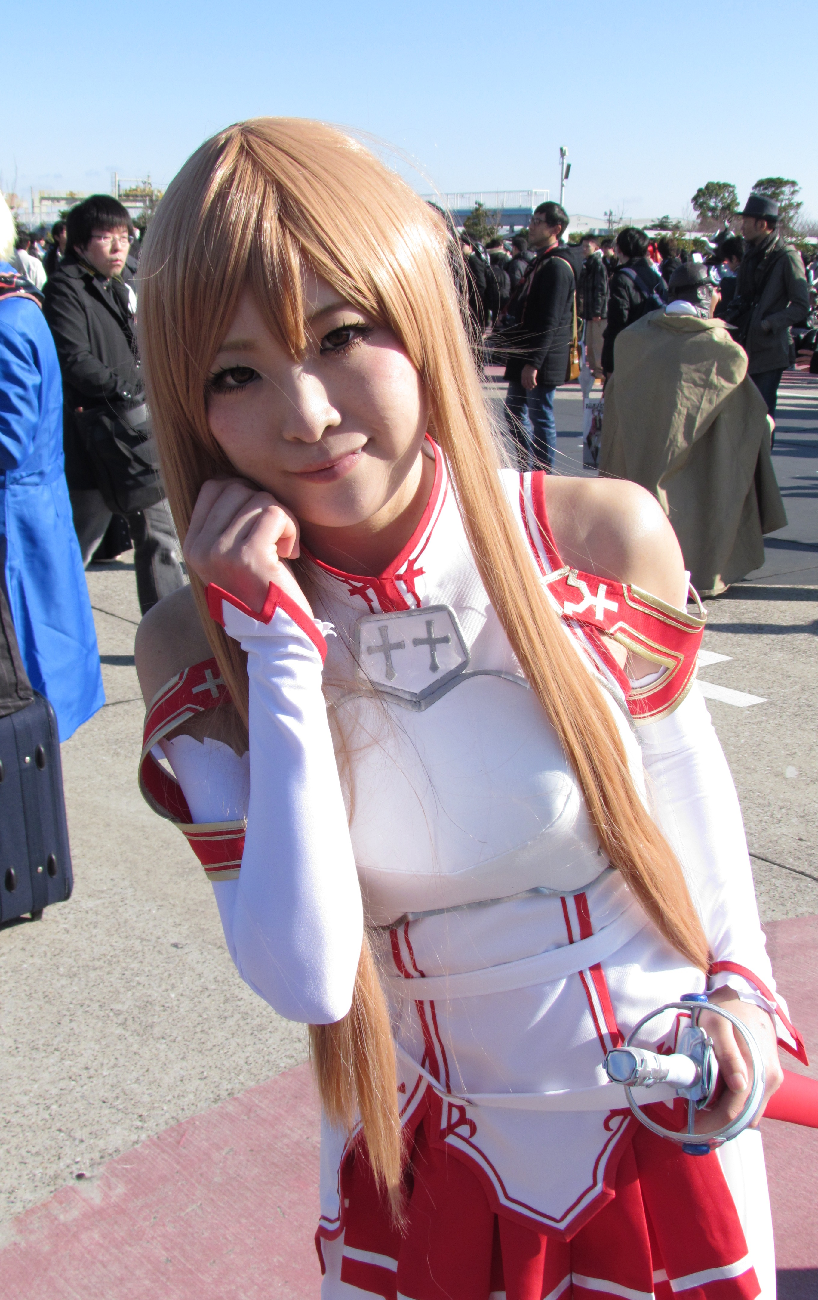 Comic Market 83，《刀劍神域》亞絲娜cosplayer。